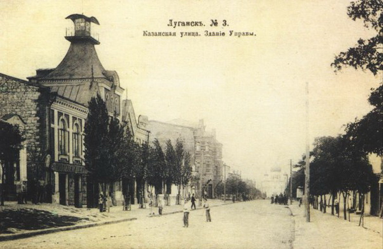 Казанська вулиця (К.Маркса) Міська управа (тепер музей міста), Азовсько-Донський Банк. Замикає перспективу Казанська церква